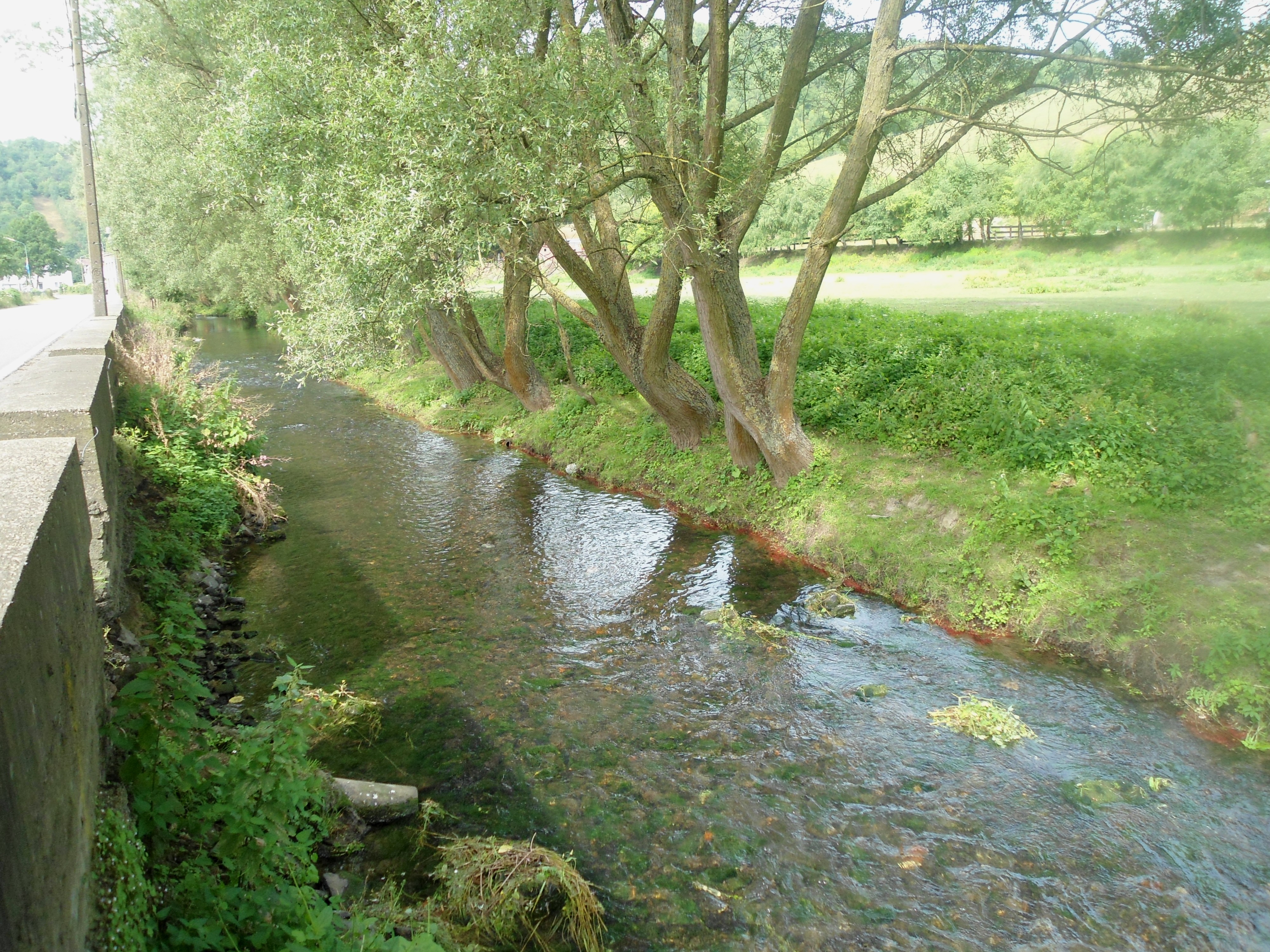 La Magne à l'entrée de Trooz